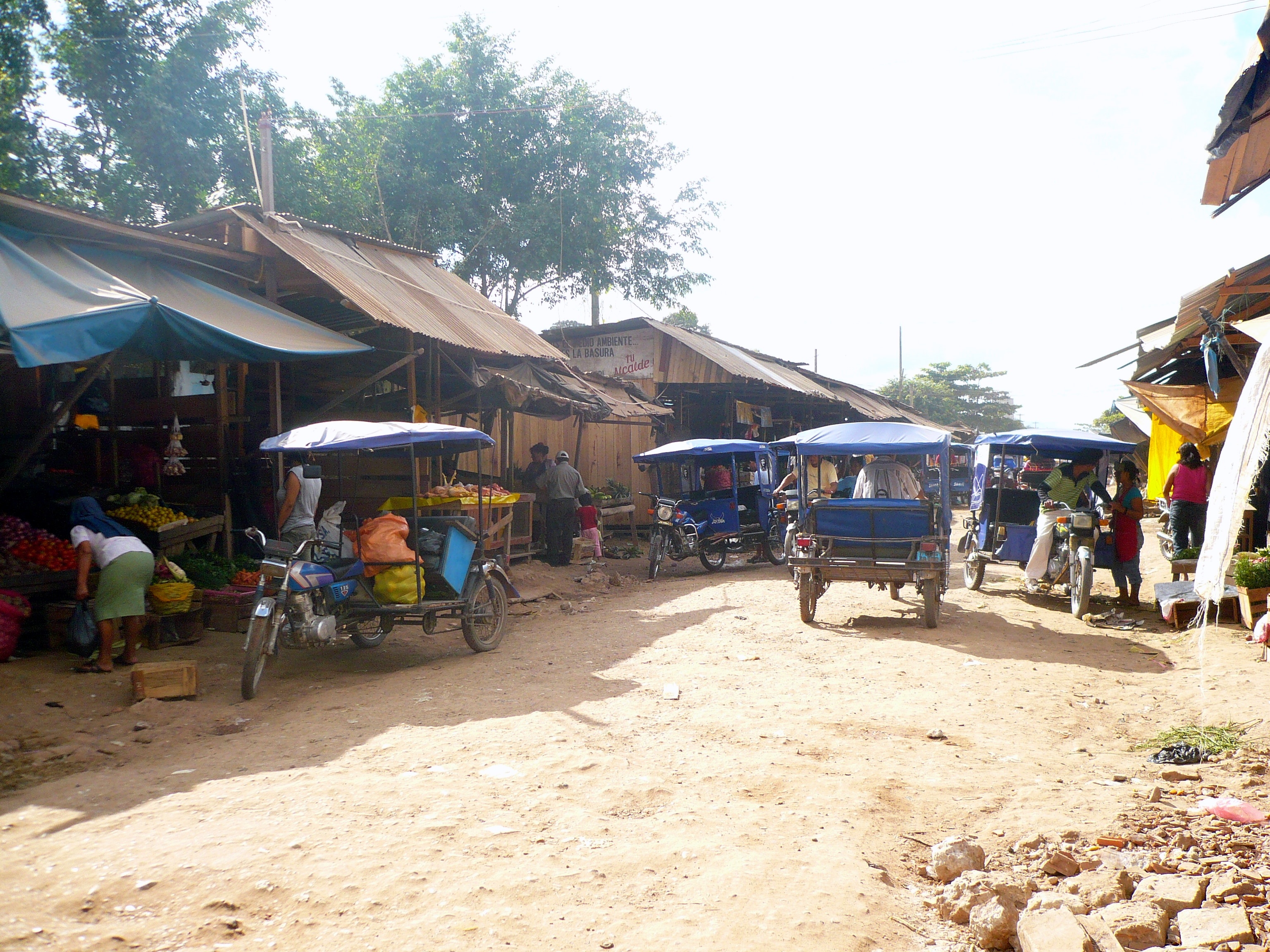 La Avenida Bellavista, mercado rural de Pucallpa (área declarado no municipal) del mismo nombre a 4 cuadras de la avenida Circuvalación hacia atras.